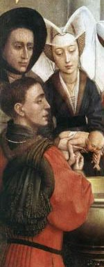 detail: Baptism